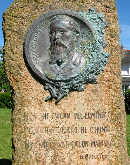 Narcisse Quellien : dédicace (Médaillon par Paul Le Goff)